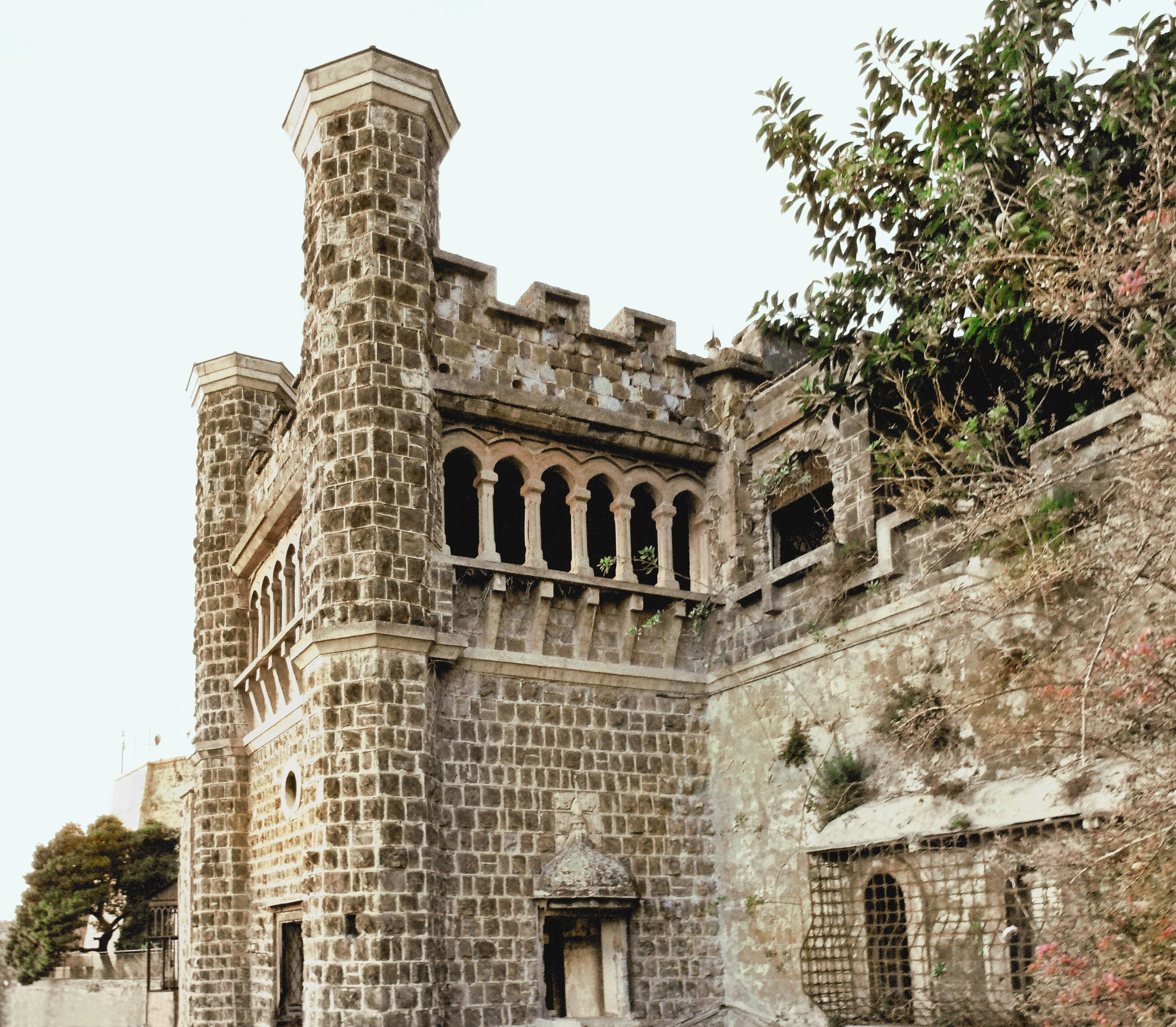 Villa Ebe, sulla collina di Pizzofalcone a Napoli